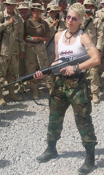 Joan Jett (rock singer)